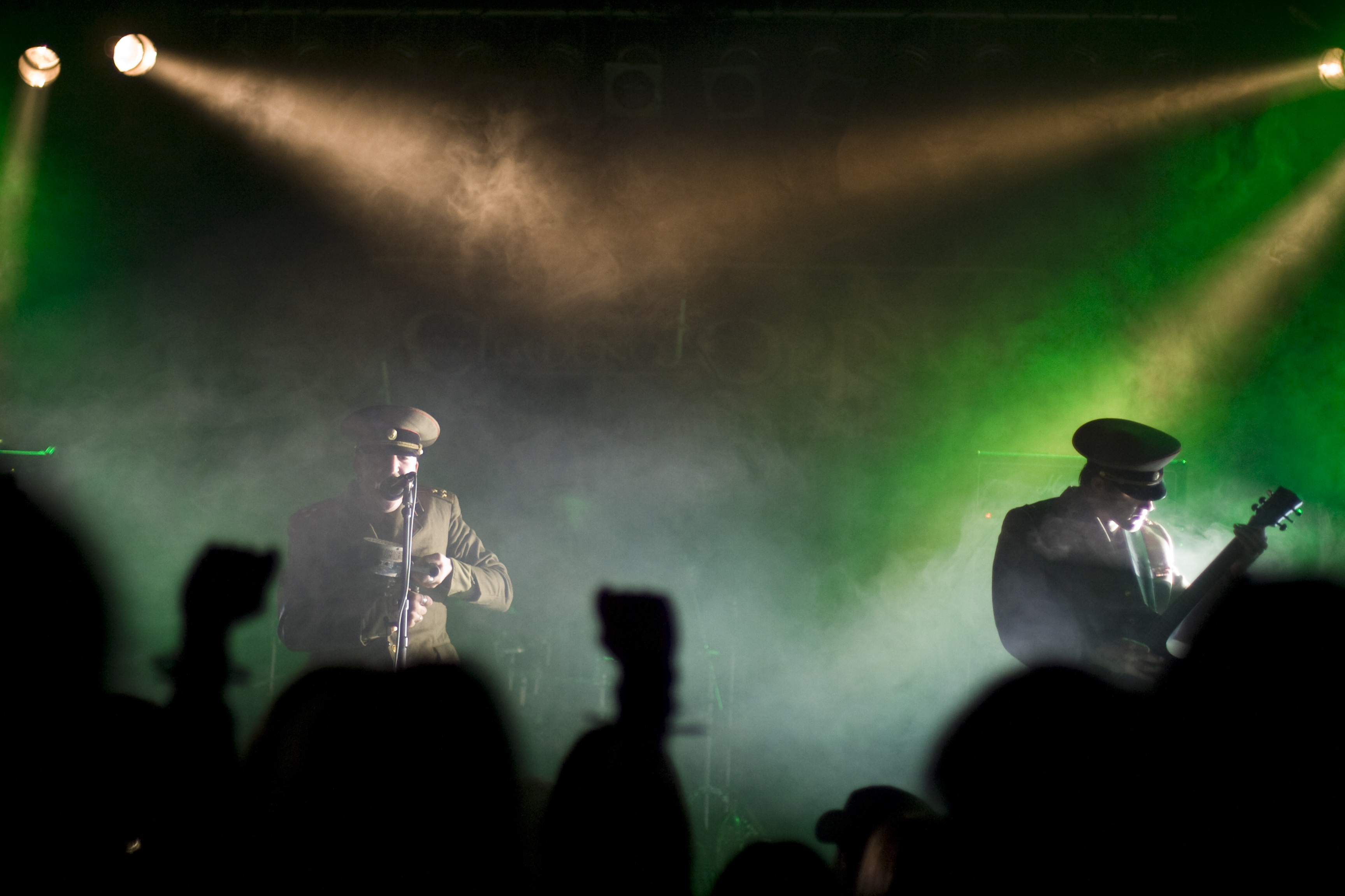 Drottnar live at EoR08